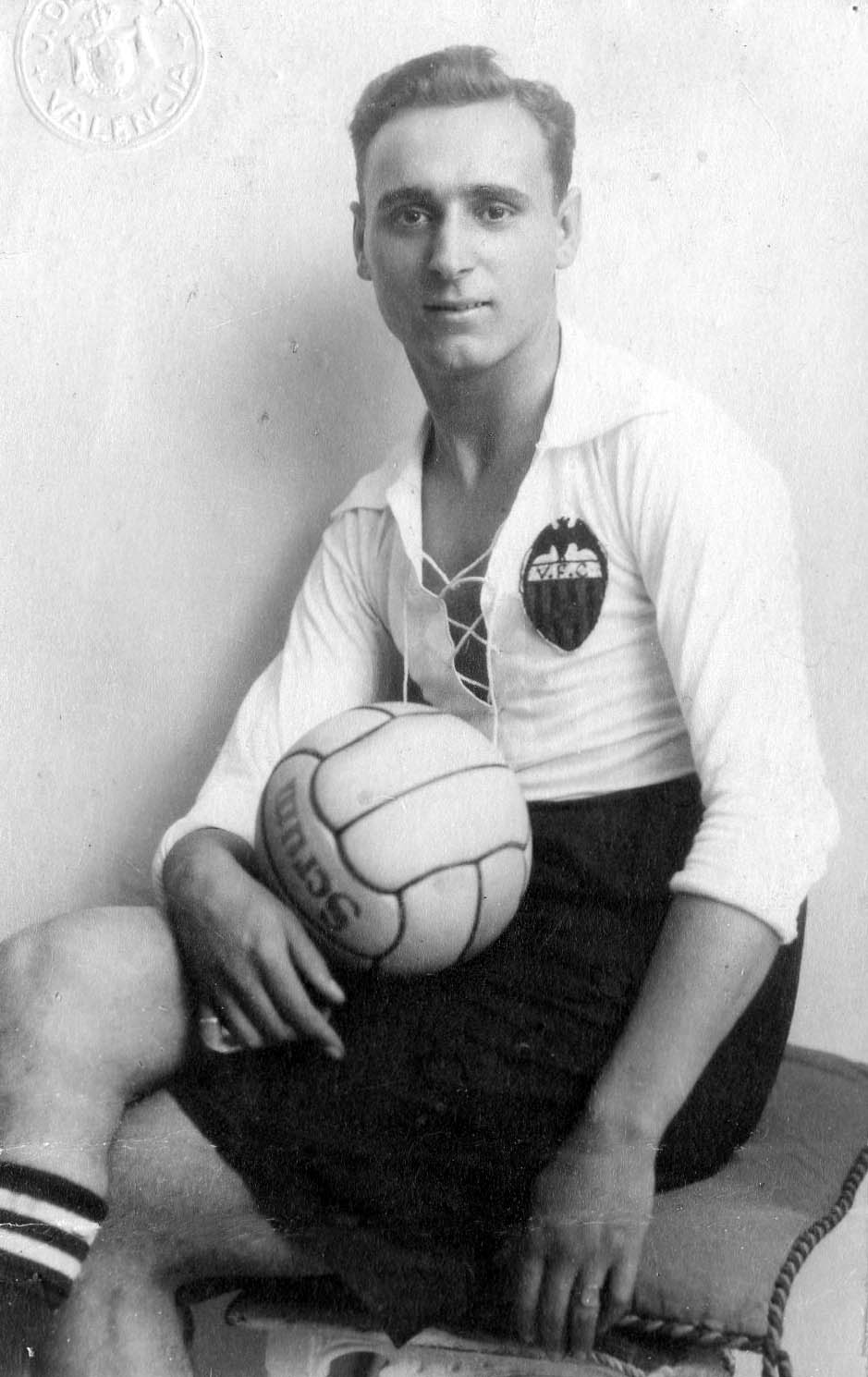 El jugador del València FC, Arturo Montesinos